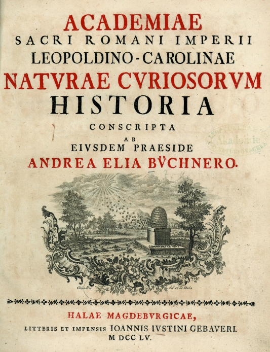 Titelblatt der ersten Geschichte der Leopoldina